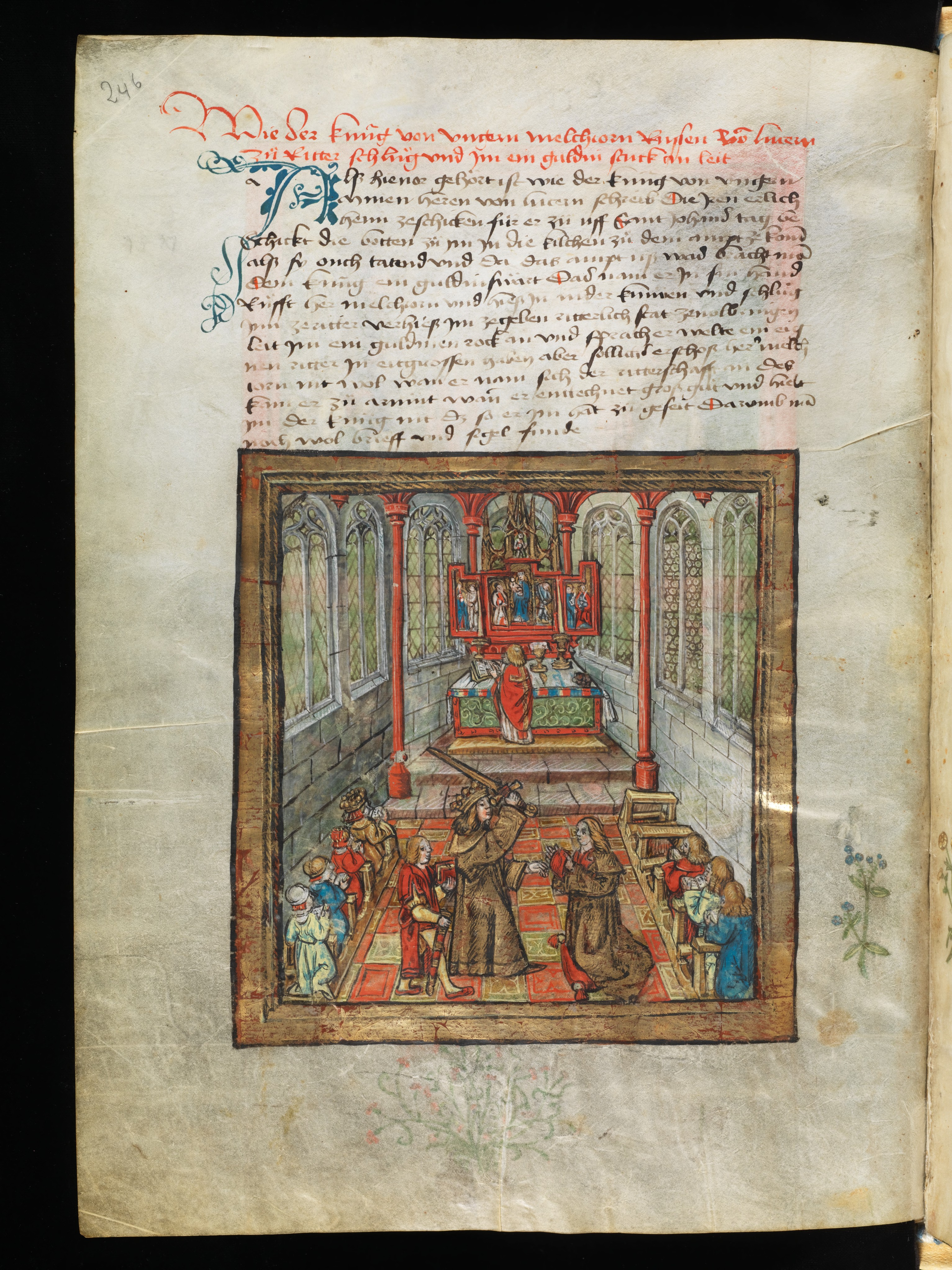 Während einer feierlichen Messe im Wiener Stephansdom schlägt König Matthias Corvinus den Luzerner Gesandten Melchior Russ zum Ritter (1478)